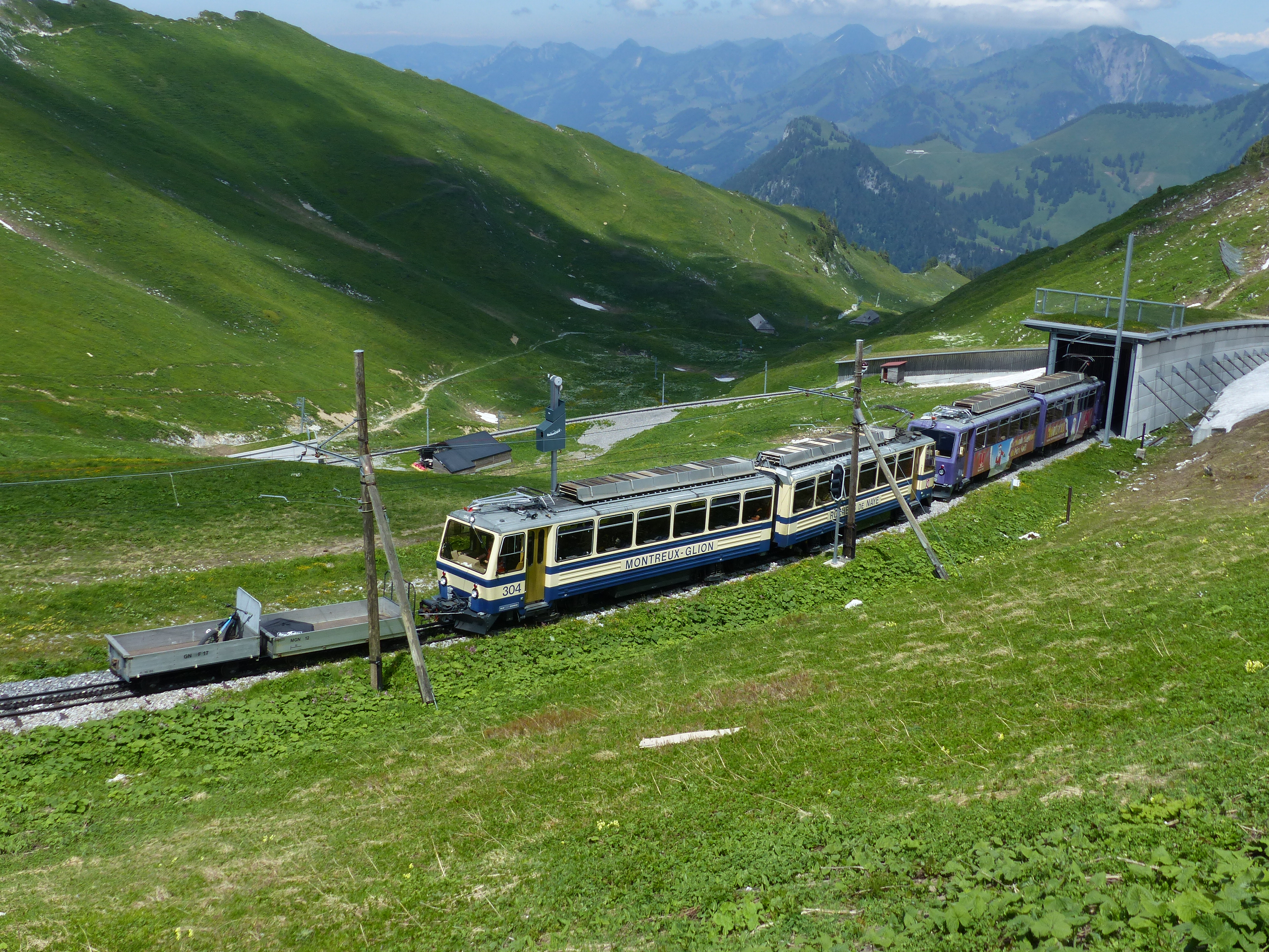 Zug führt in die Bergstation Rochers de Naye ein